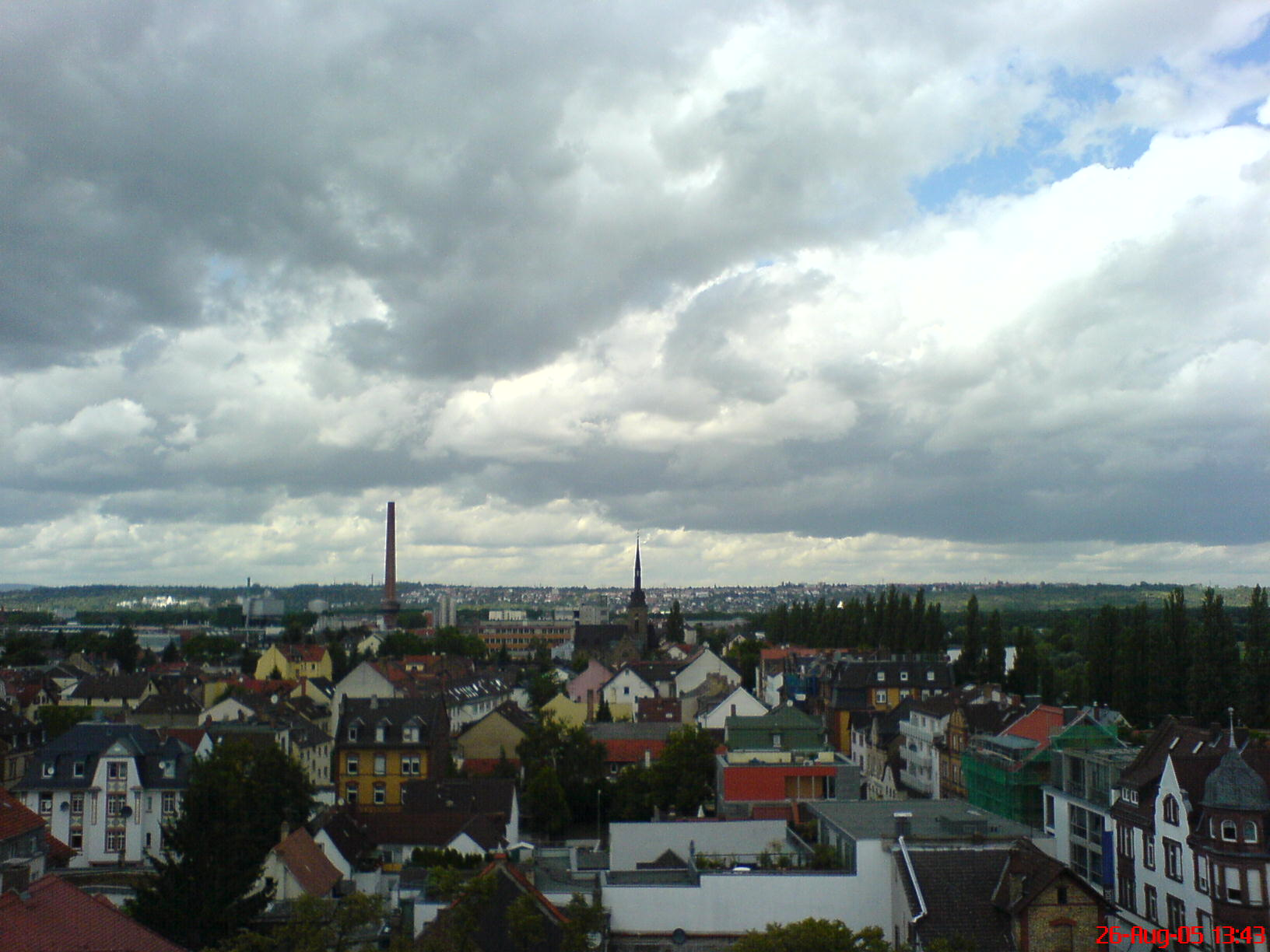 selbst aufgenommen